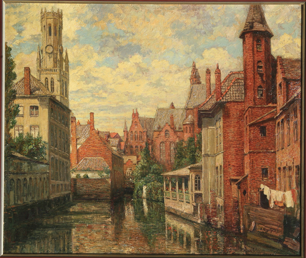 Albert Engstfeld: Das alte Brügge, vor 1914